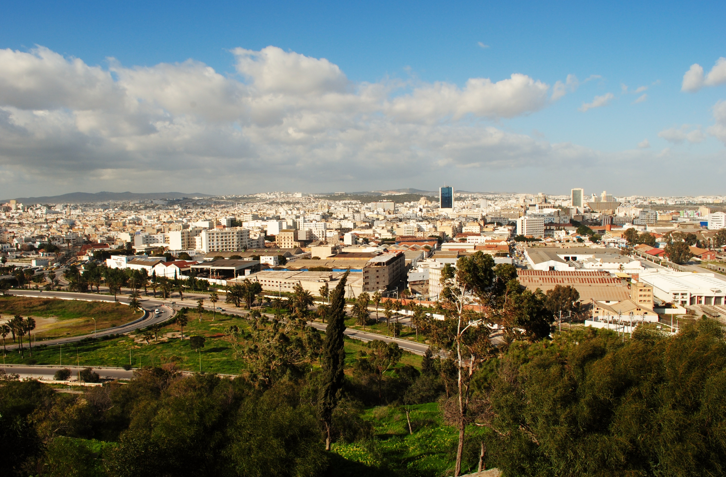 Vue sur la ville de Tunis de la montagne de Sidi Belhassen